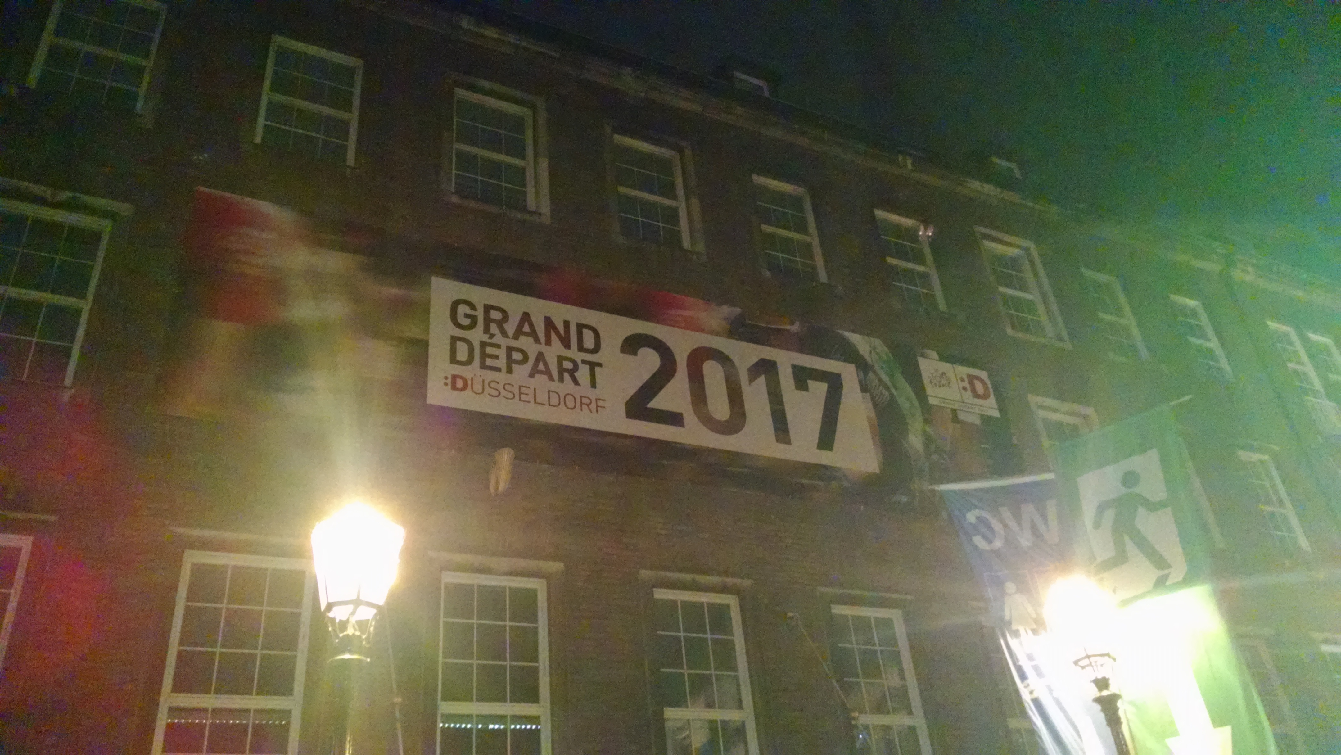 Tour de France 2017 - Grand Départ Düsseldorf - Marktplatz, Rathaus